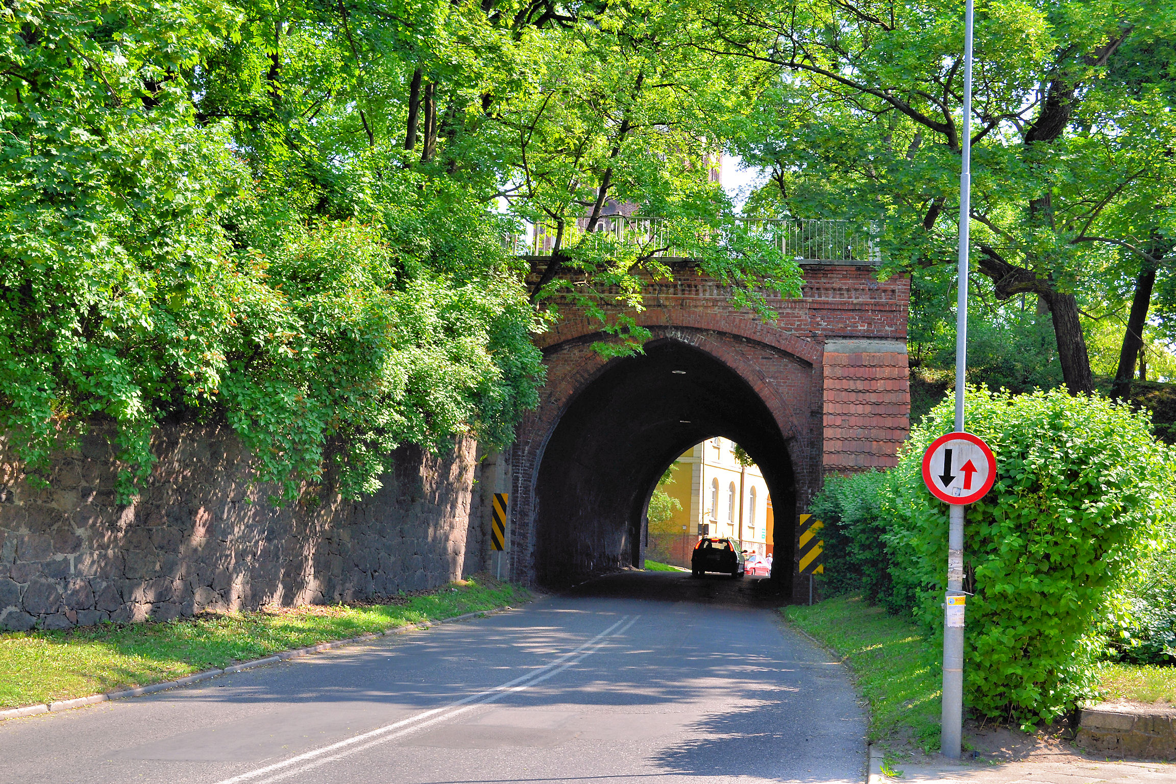 Brama Świętojańska w Stargardzie Szczecińskim